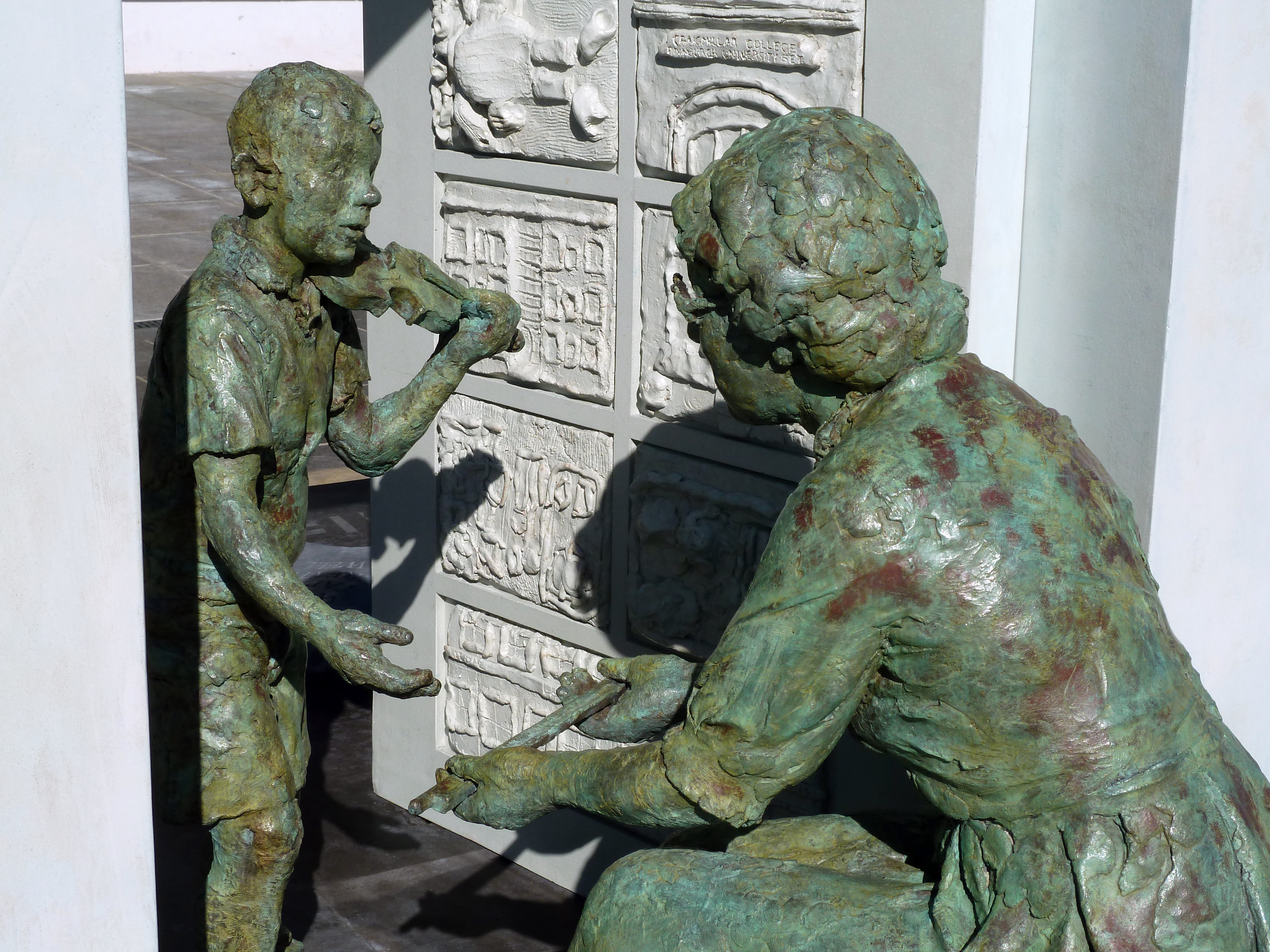 Statue in memory of Helen Crummy at Niddrie Mains Road, Edinburgh